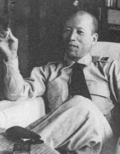 溪口泰麿（第2代自衛艦隊司令官）